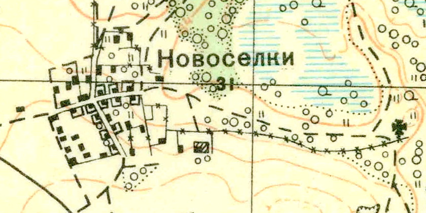 Топографическая карта Ленинградской области, квадрат О-35-22-Г-а (Керстово), деревня Новосёлки.